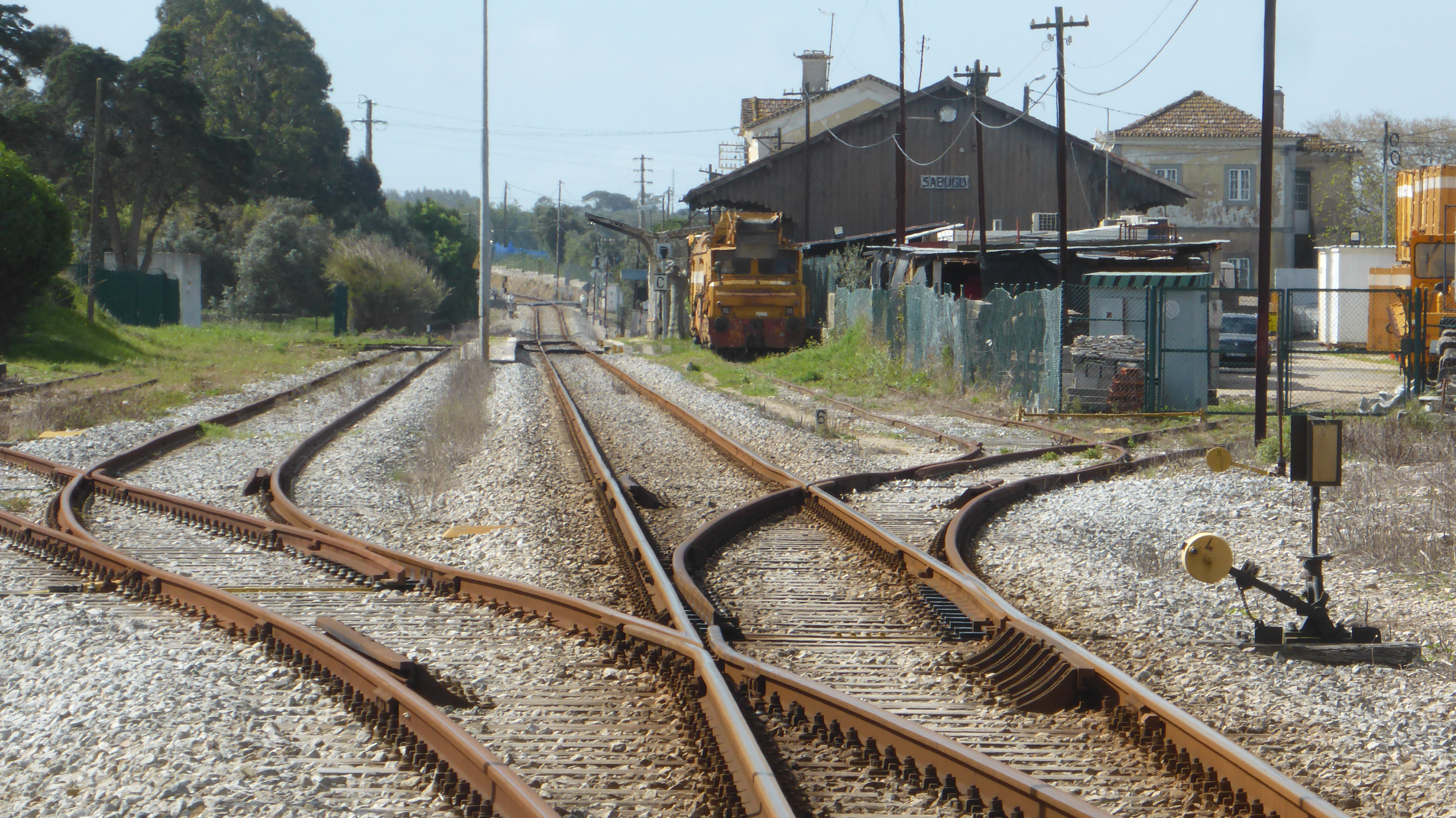 Serra de Olelas